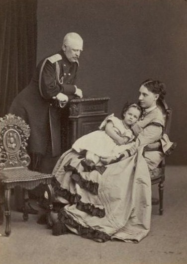 Владимир Дмитриевич Голицын (1815—1888) с женой Марией Михайловной (1836-1910) и дочерью Марией (1860—1933).